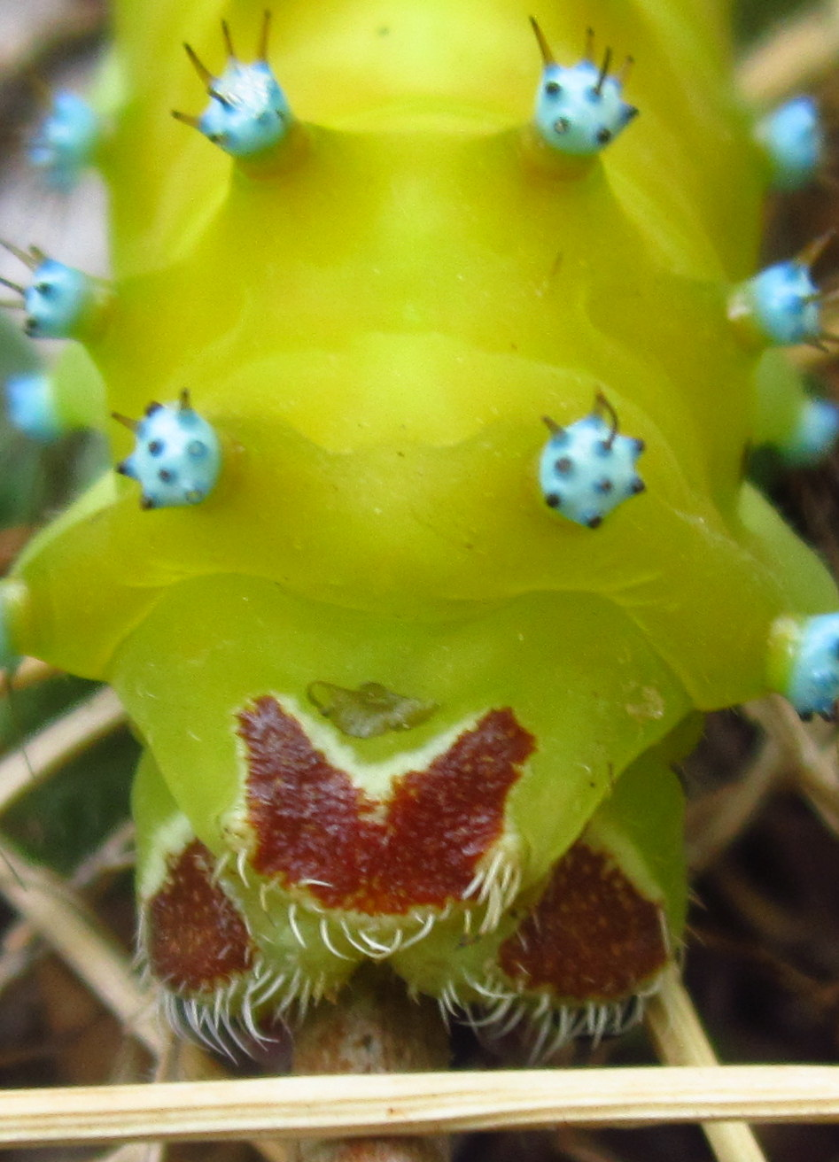 Caterpillar of Saturnia pyri